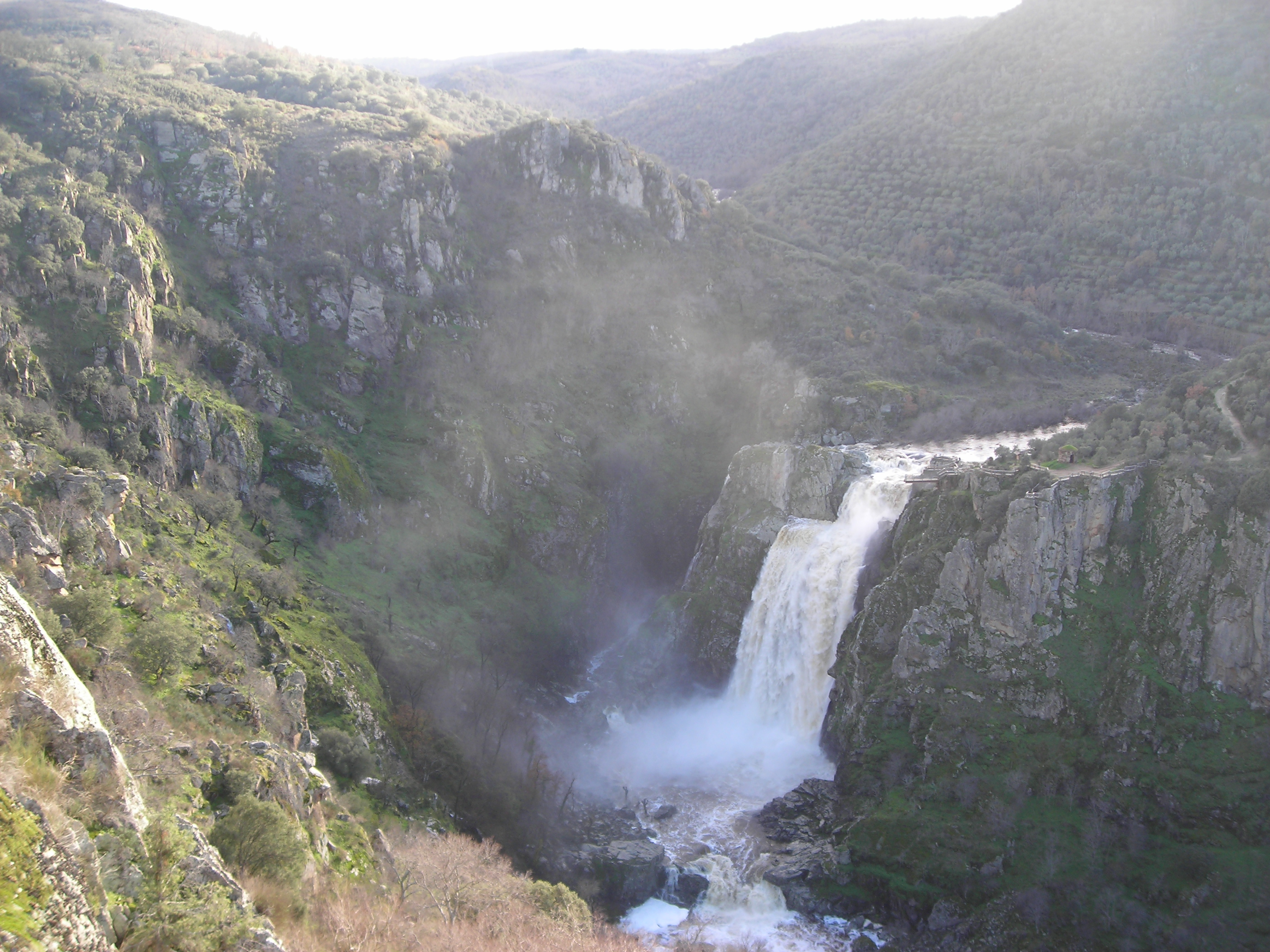 CASCADA DEL RIO UCES A SU PASO POR PEREÑA